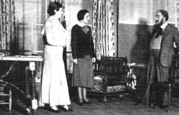 Escena del estreno de la obra de teatro Cuando los hijos de Eva no son los hijos de Adán, de Jacinto Benavente